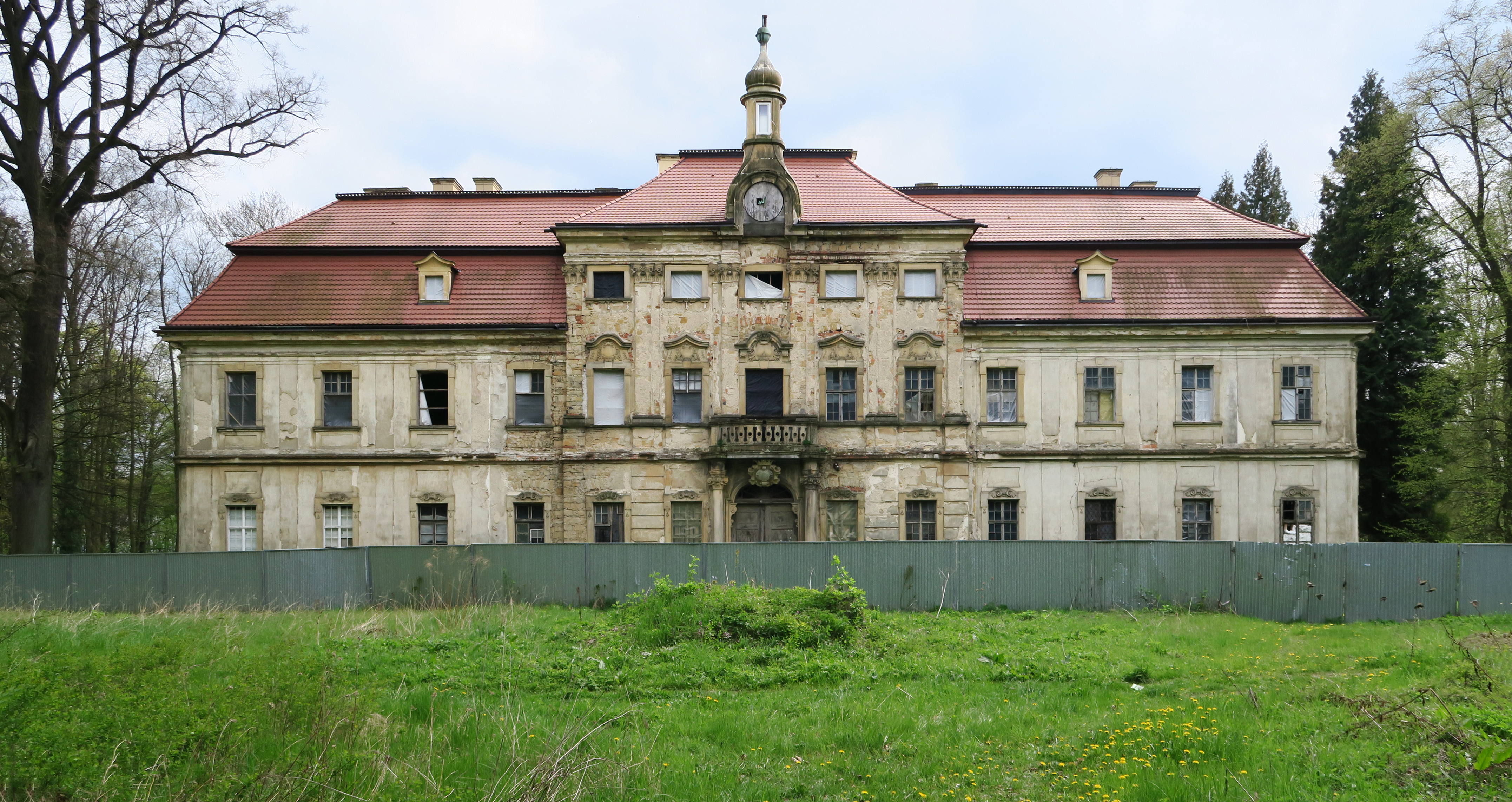 Pałac w Grodźcu - 2016